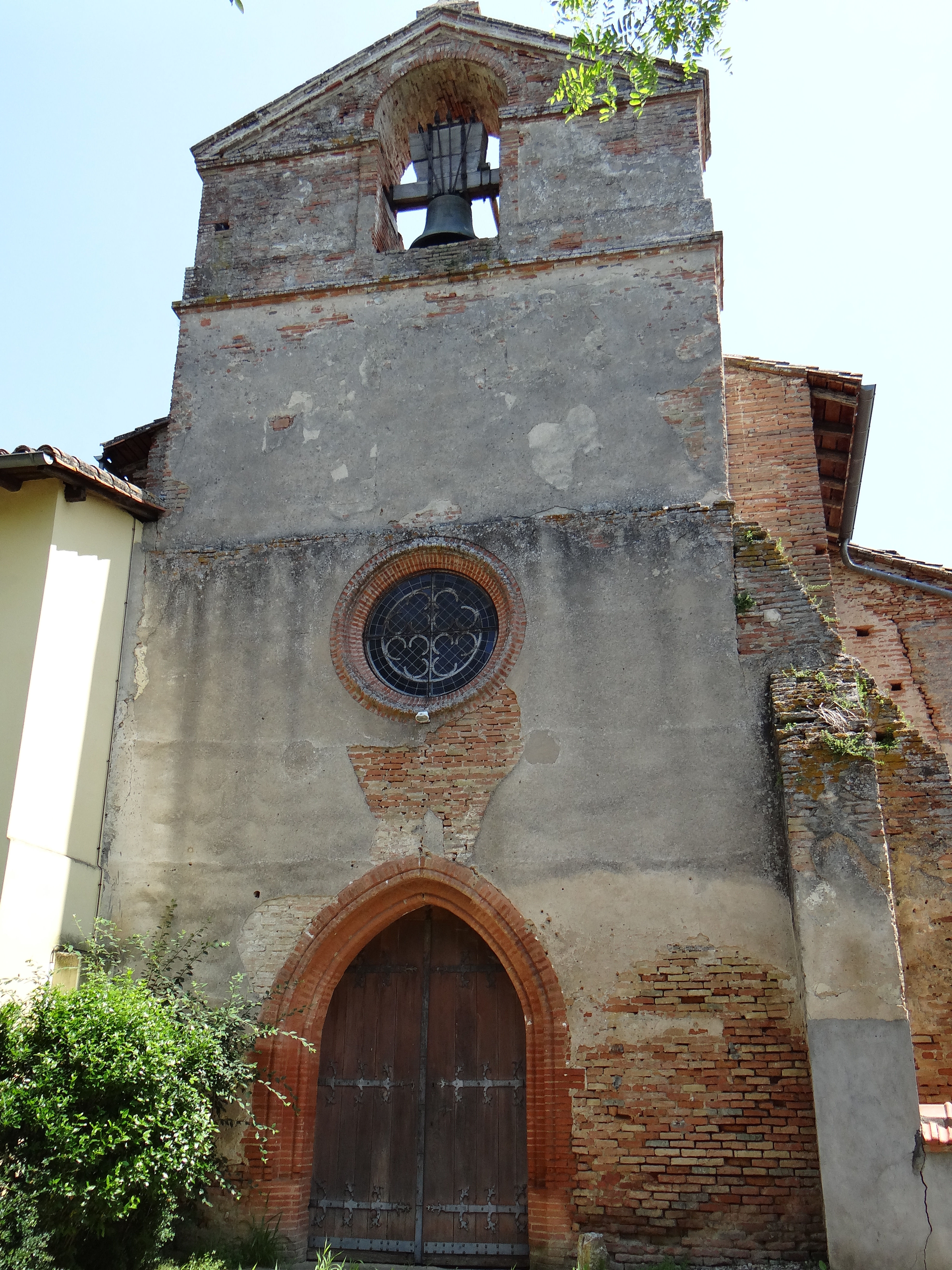 Piquecos - Église Saint-Félix - Façade et clocher